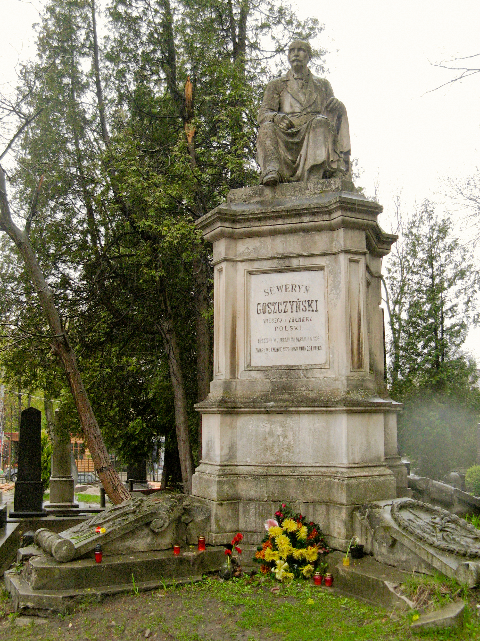 Grób Seweryna Goszczyńskiego na cmentarzu łyczakowskim we Lwowie.